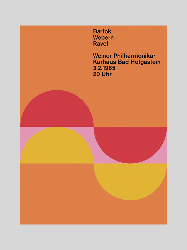 HfG Ulm Design: Margarete Kögler Lecturer: Otl aicher Poster